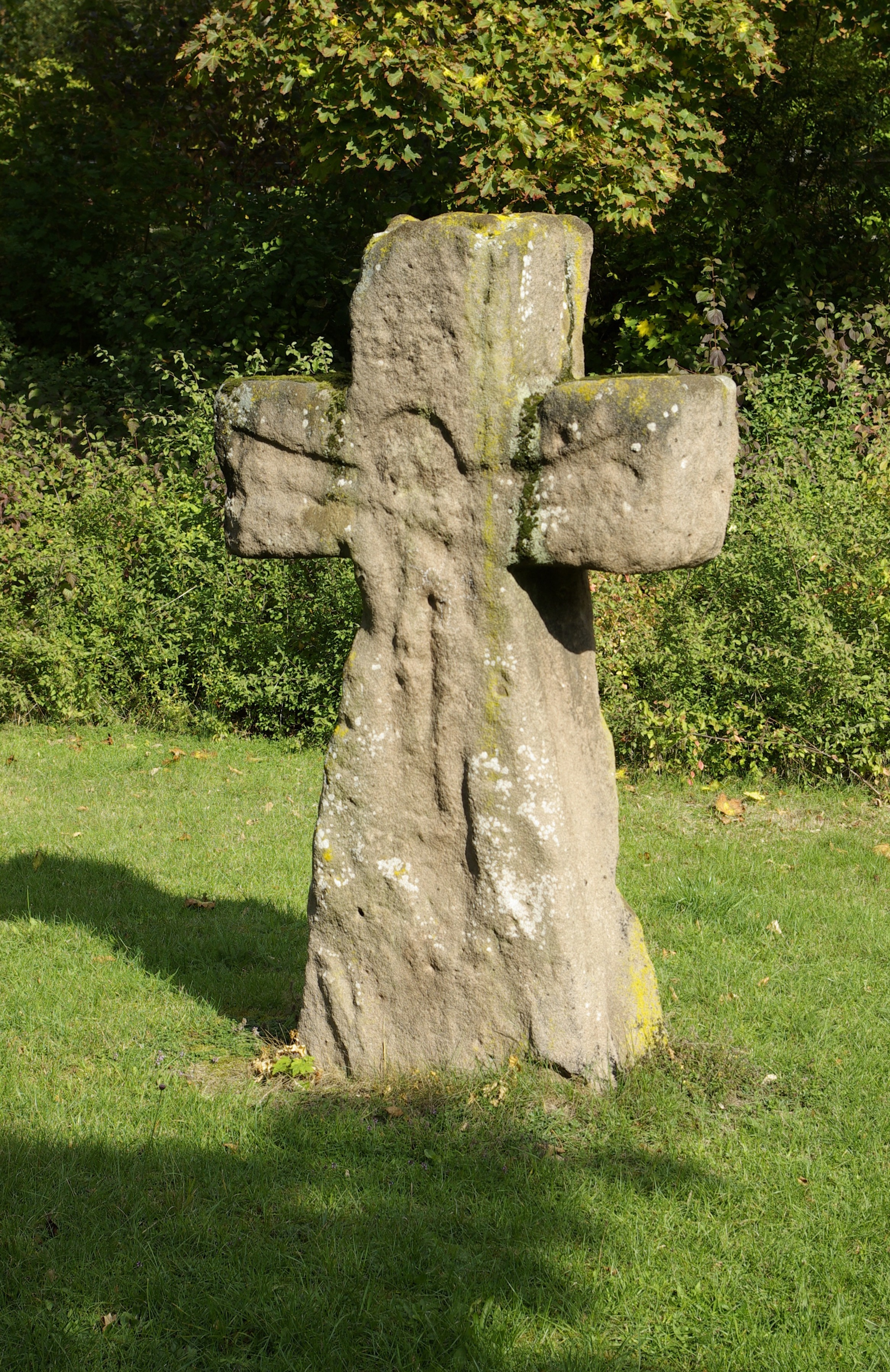 Der mittelalterliche Kreuzstein im Erlanger Stadtteil Eltersdorf